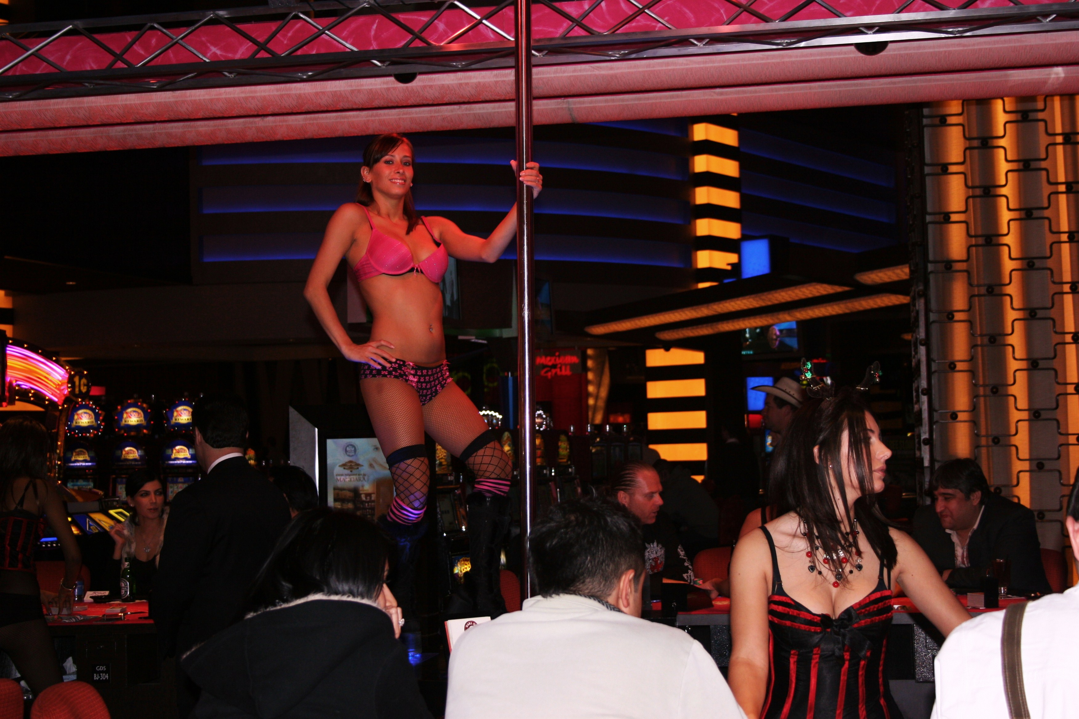 نمایی از رقصندگان پای میز قمار در هتل هتل و کازینوی پلانت هالیوود، ایالات متحده آمریکا.